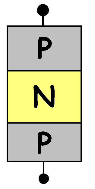 Diak typu PNP